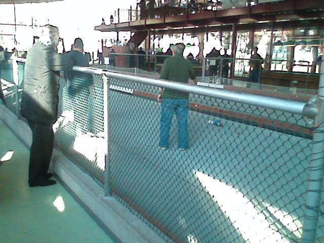 acli bocciofila